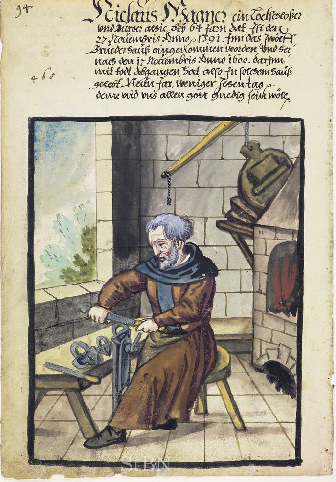 Niclaus (Nicolaus; Nikolaus) Wagner, Loetschloßer (Lötschlosser; Schlosser) Transkription und weitere Informationen